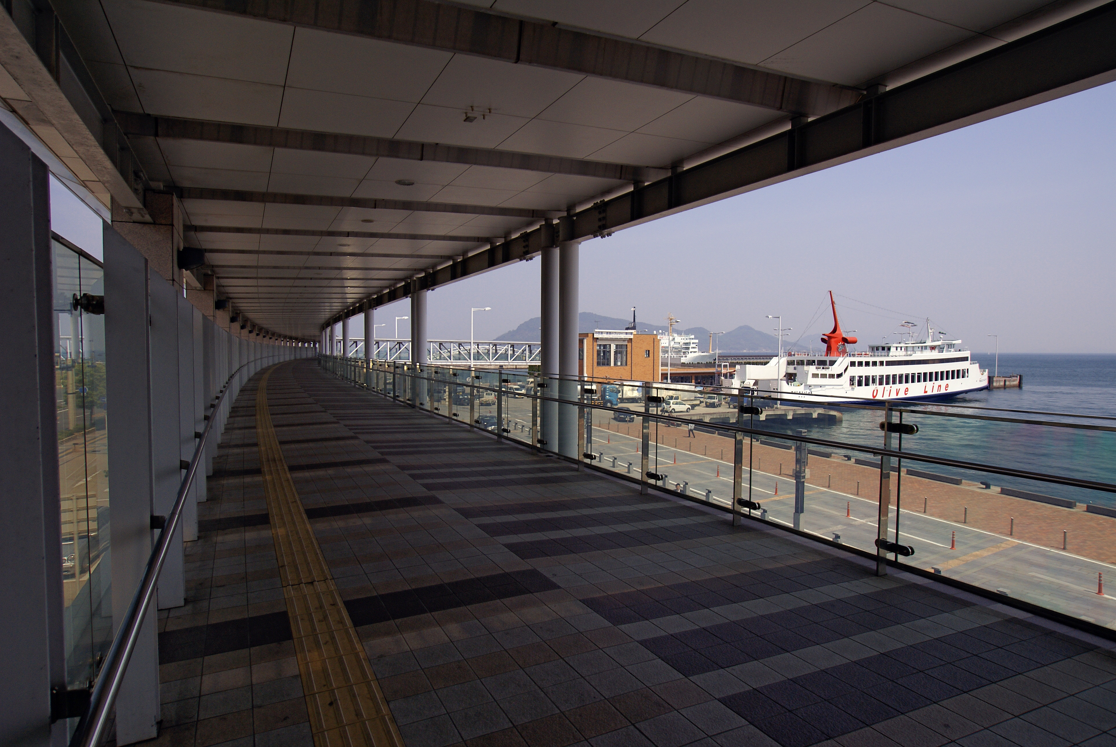 Takamatsu corridor in Sunport Takamatsu, Kagawa prefecture, Japan